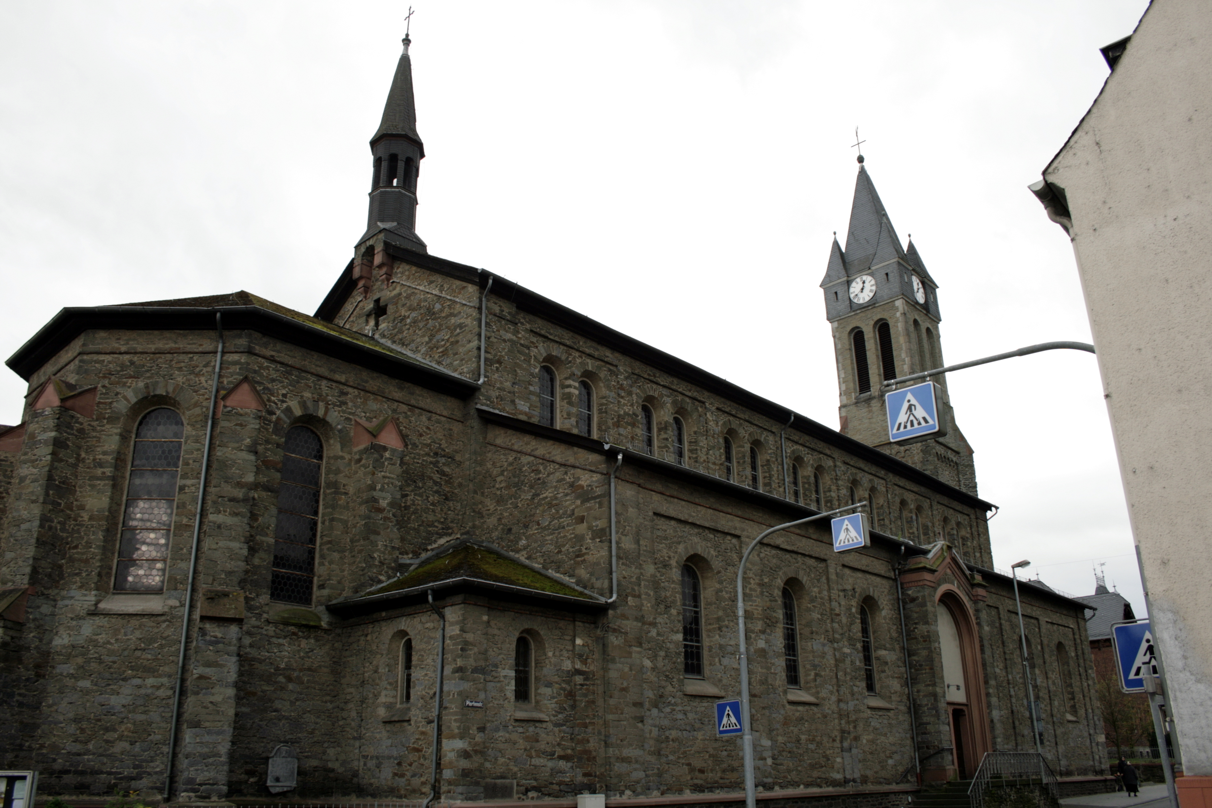 Pfarrkirche St. Johannes der Täufer in Elz, Deutschland